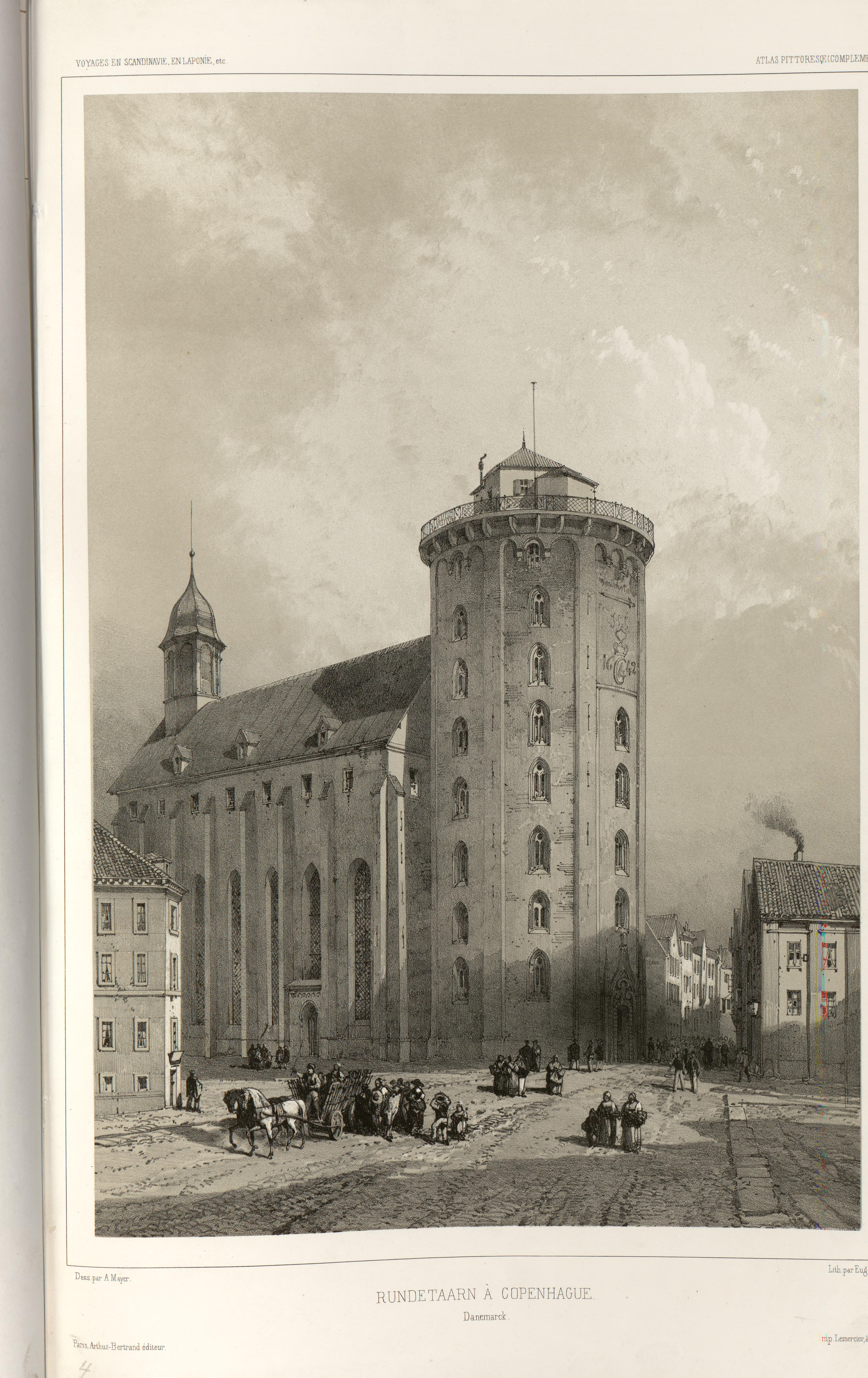 Illustrasjon hentet fra boken "Voyages de la Commission scientifique du Nord, en Scandinavie, en Laponie, au Spitzberg et aux Feröe" av ukjent forfatter og utgitt av Arthus BertrandParis : Arthus Bertrand, [1852] (Paris, [1852])